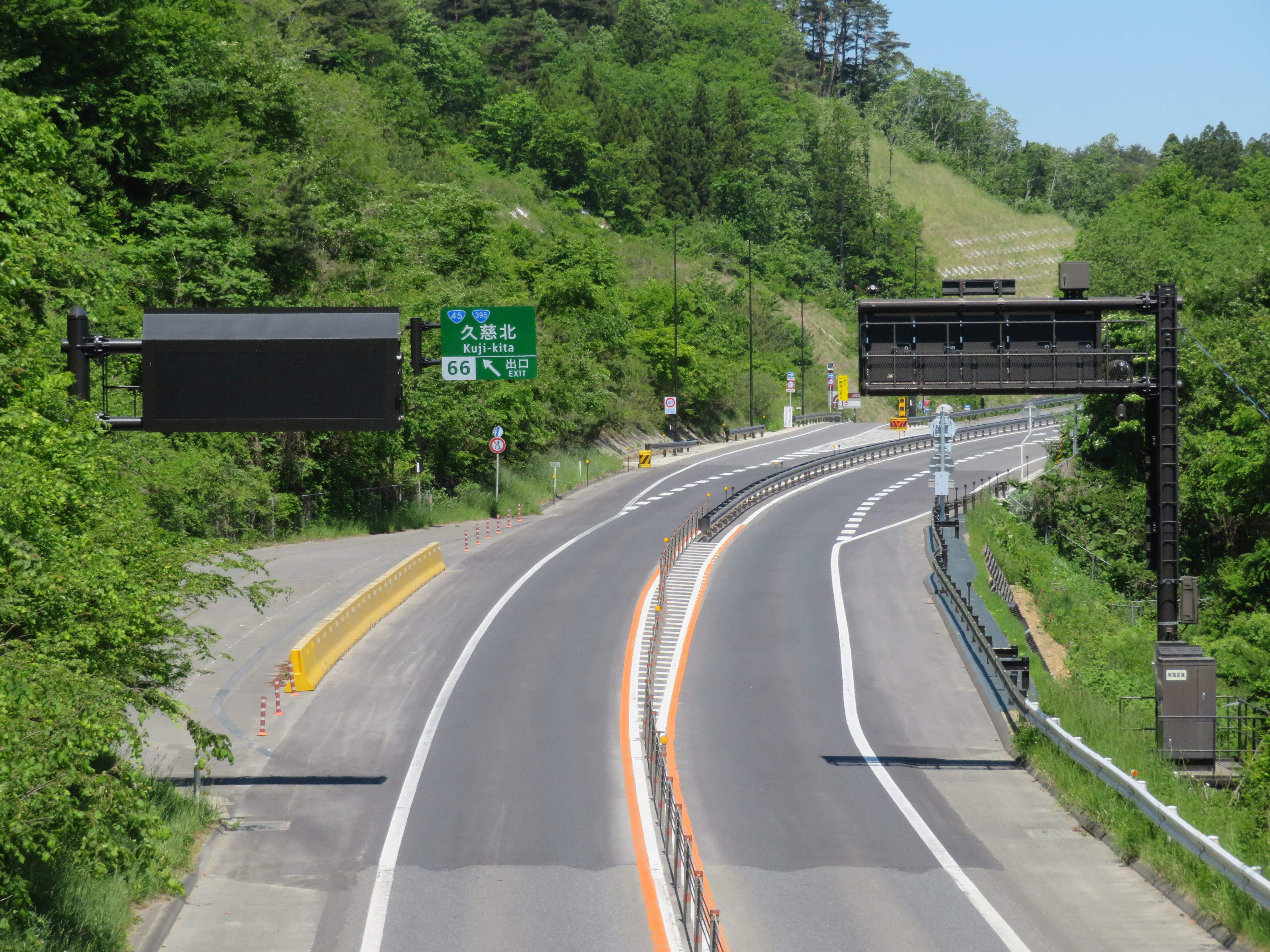 八戸久慈自動車道久慈北ＩＣ出入口付近（久慈ＩＣ方面側から撮影） Canon PowerShot SX720 HS